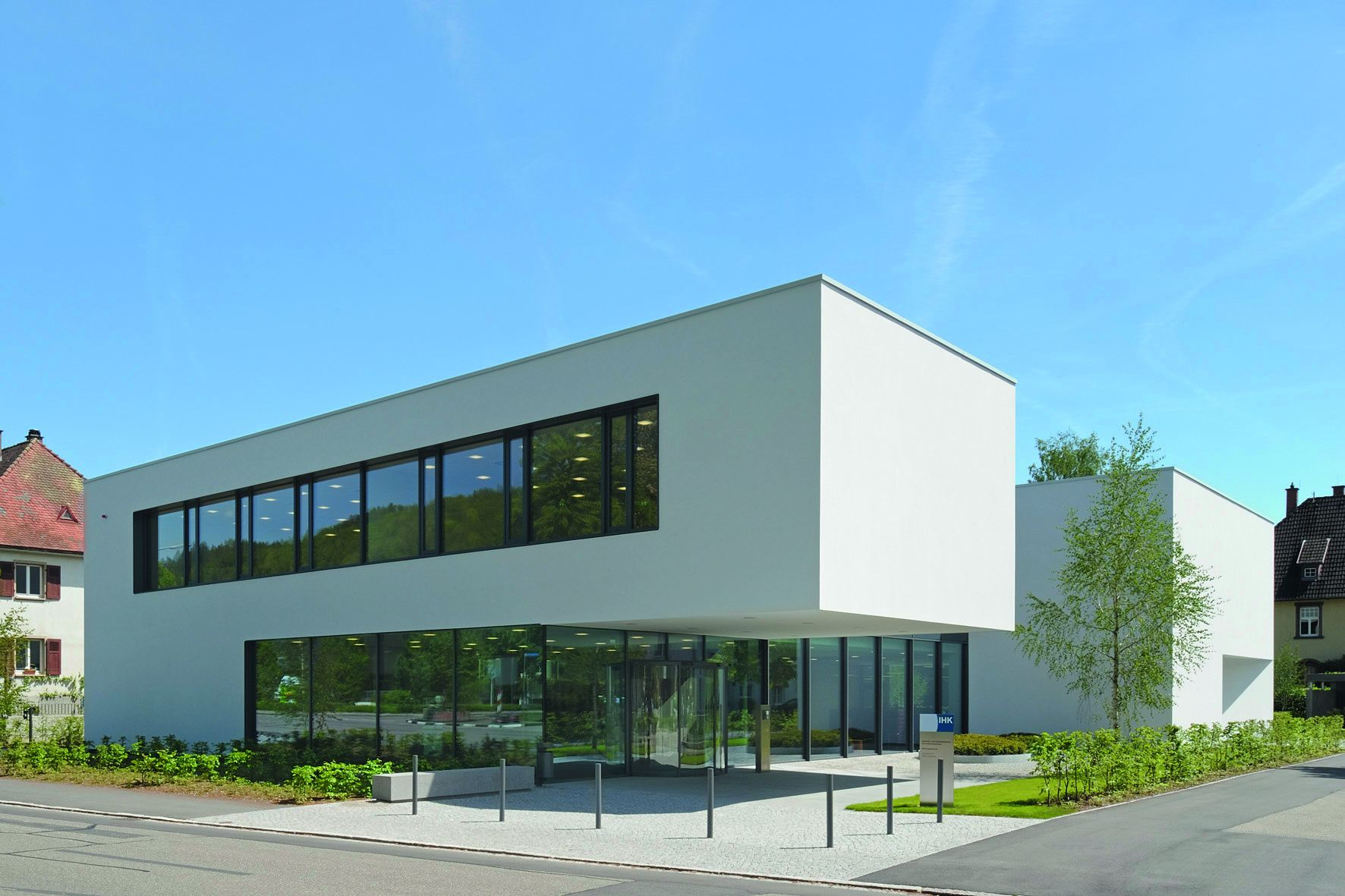 Das Bildungszentrum ergänzt die dortige Hauptgeschäftsstelle der IHK Hochrhein-Bodensee